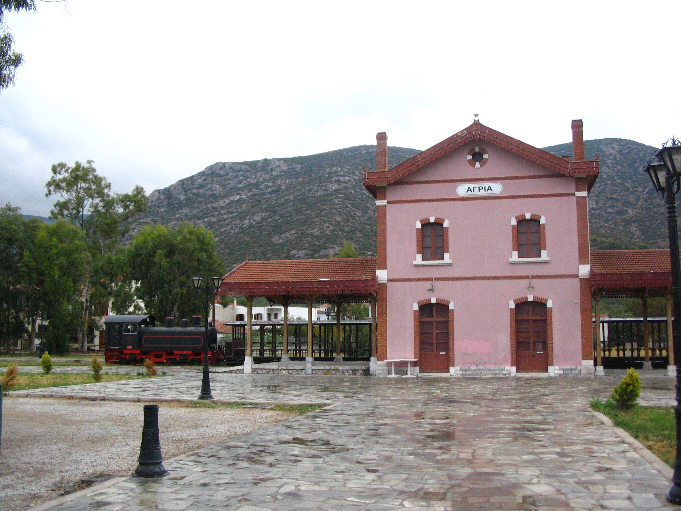 Станция туристической ж\д на полуострове Пилион, в пригороде Волоса, Греция